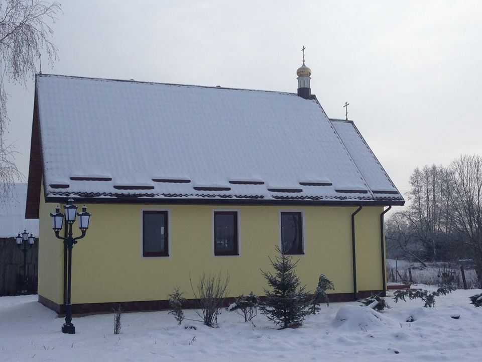 Cerkiew Staroobrzędowców